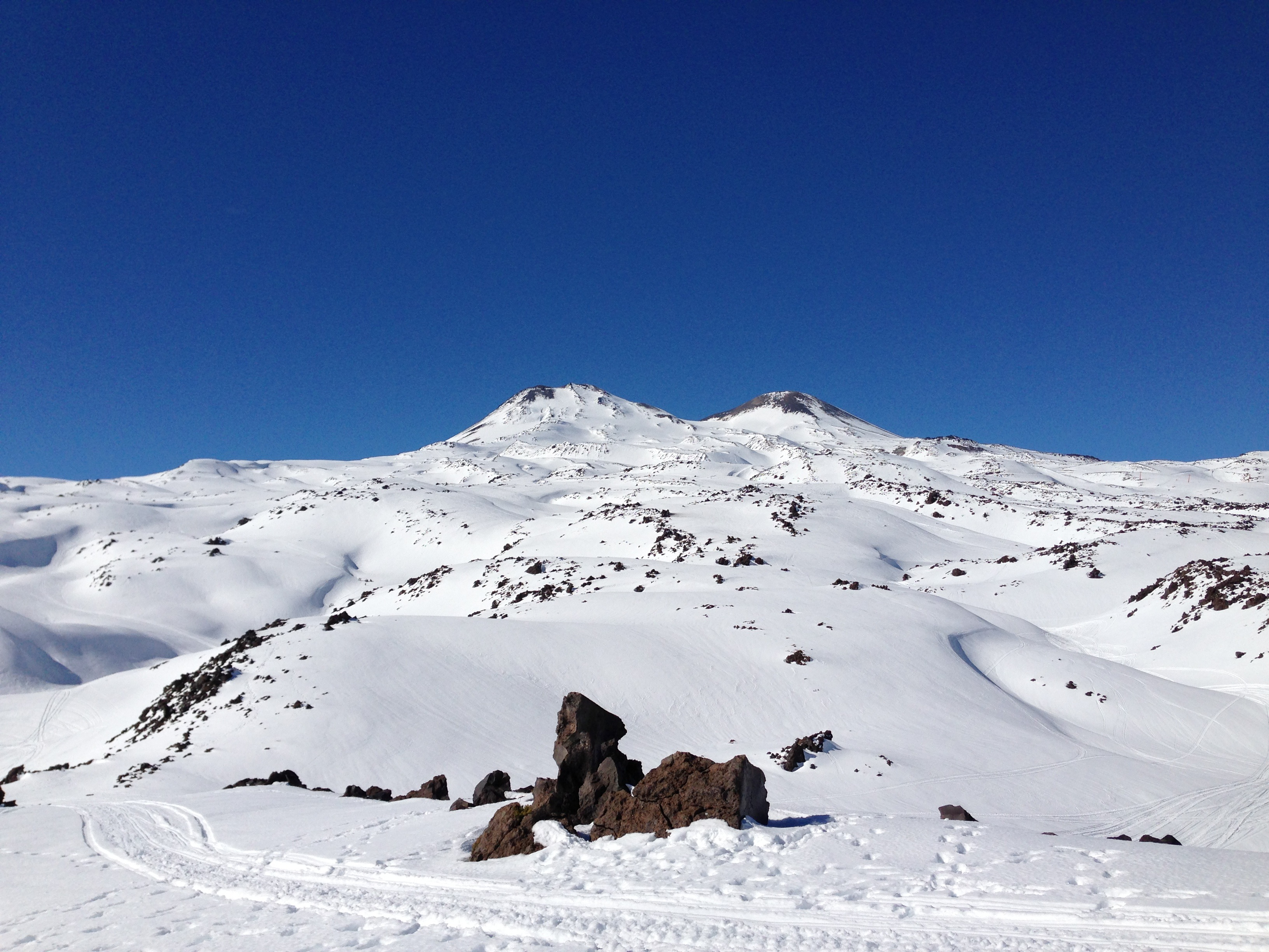 La cima de la izquierda corresponde al volcán nuevo, actualmente activo, y el de la derecha al volcán viejo, pasivo.